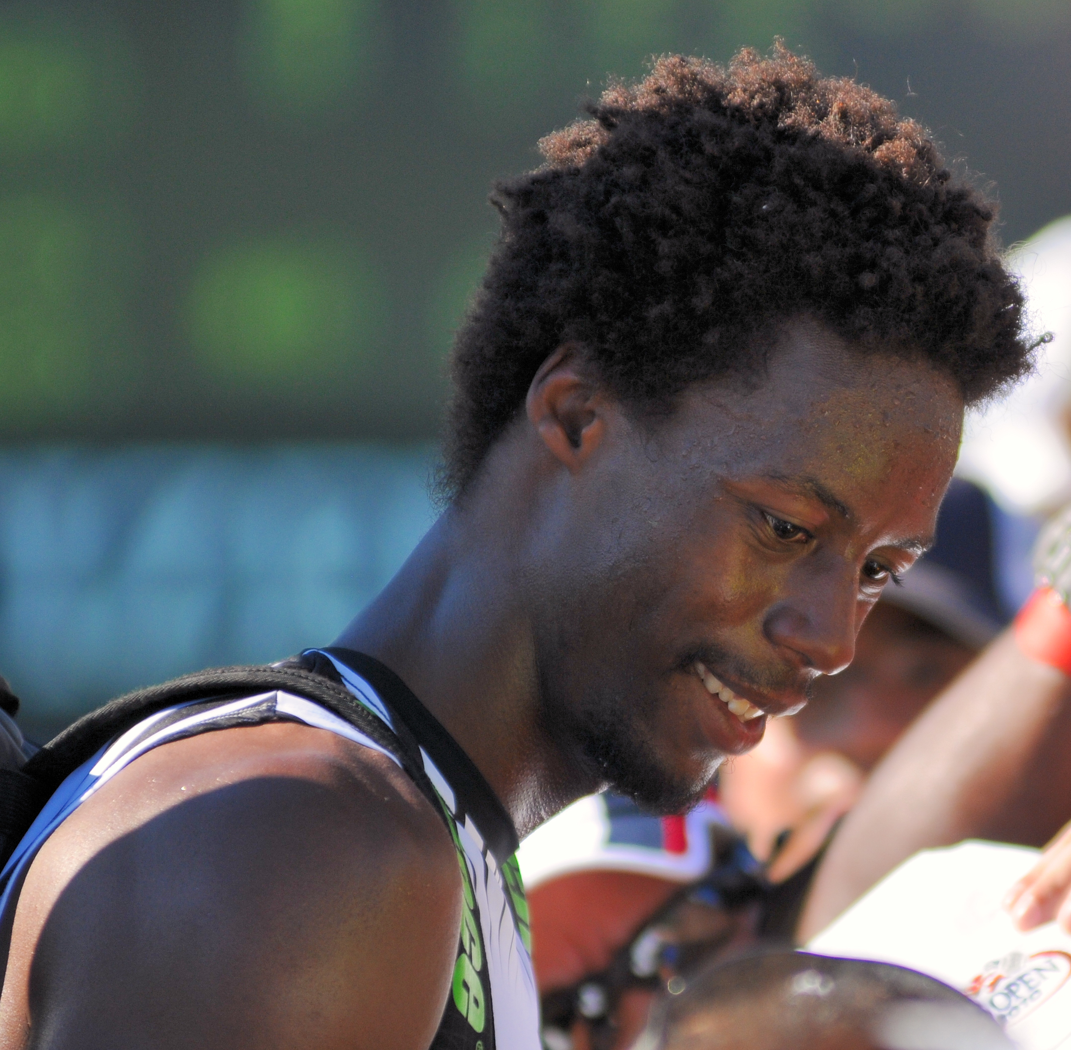 Gael Monfils - US Open 2010